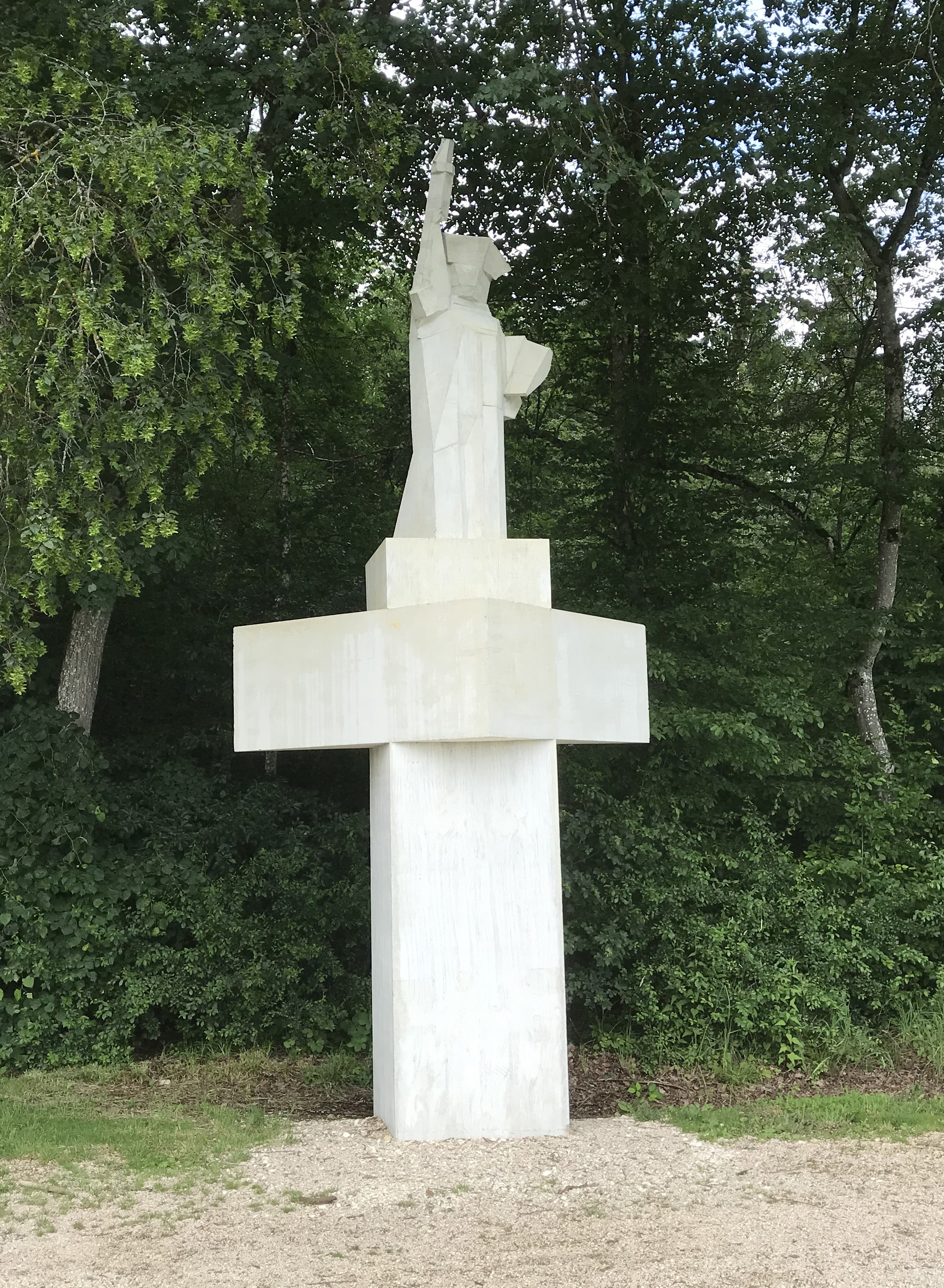 Mögglingen - Libertas. Die Freiheitsstatue entstand als Station 2 der „16 Stationen“ der Remstalgartenschau 2019.